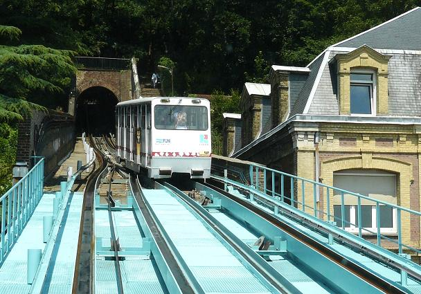 Funikular w Hawrze